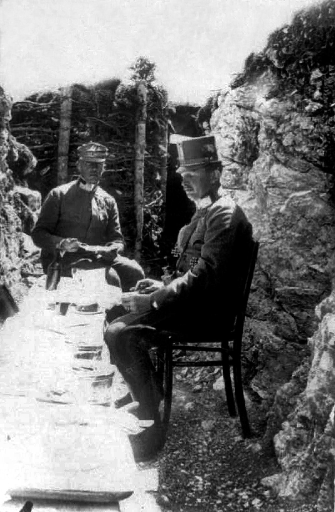 EHZ-Thronfolger Karl und sein Generalstabschef Oberst Alfred Freiherr von Waldstätten beim Mittagsmahl im Schützengraben auf der Costilla 1916